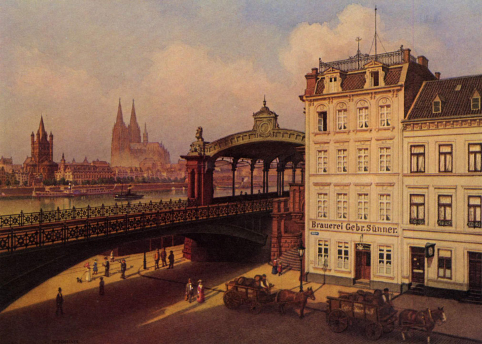 "Köln, Deutzer Freiheit mit Altstadt und Brauerei Sünner"; Gemalt im Auftrag der abgebildeten Brauerei Sünner, an deren Stelle das heutige Lufthansahochhaus steht